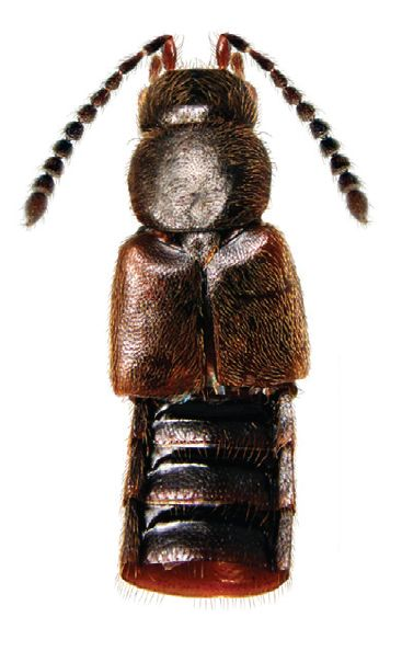 Philhygra angusticauda